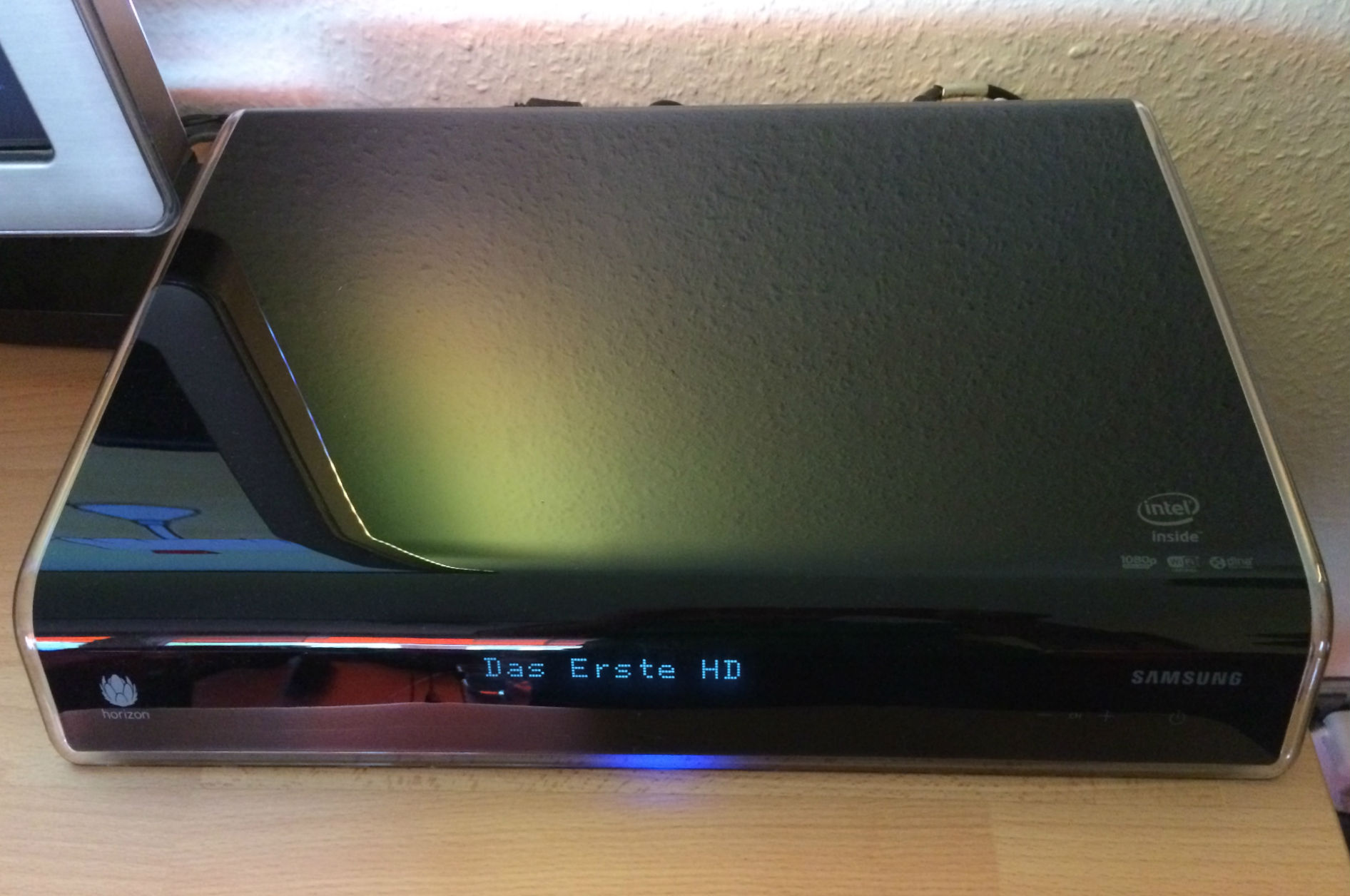 Horizon HD Recorder von Unitymedia KabelBW